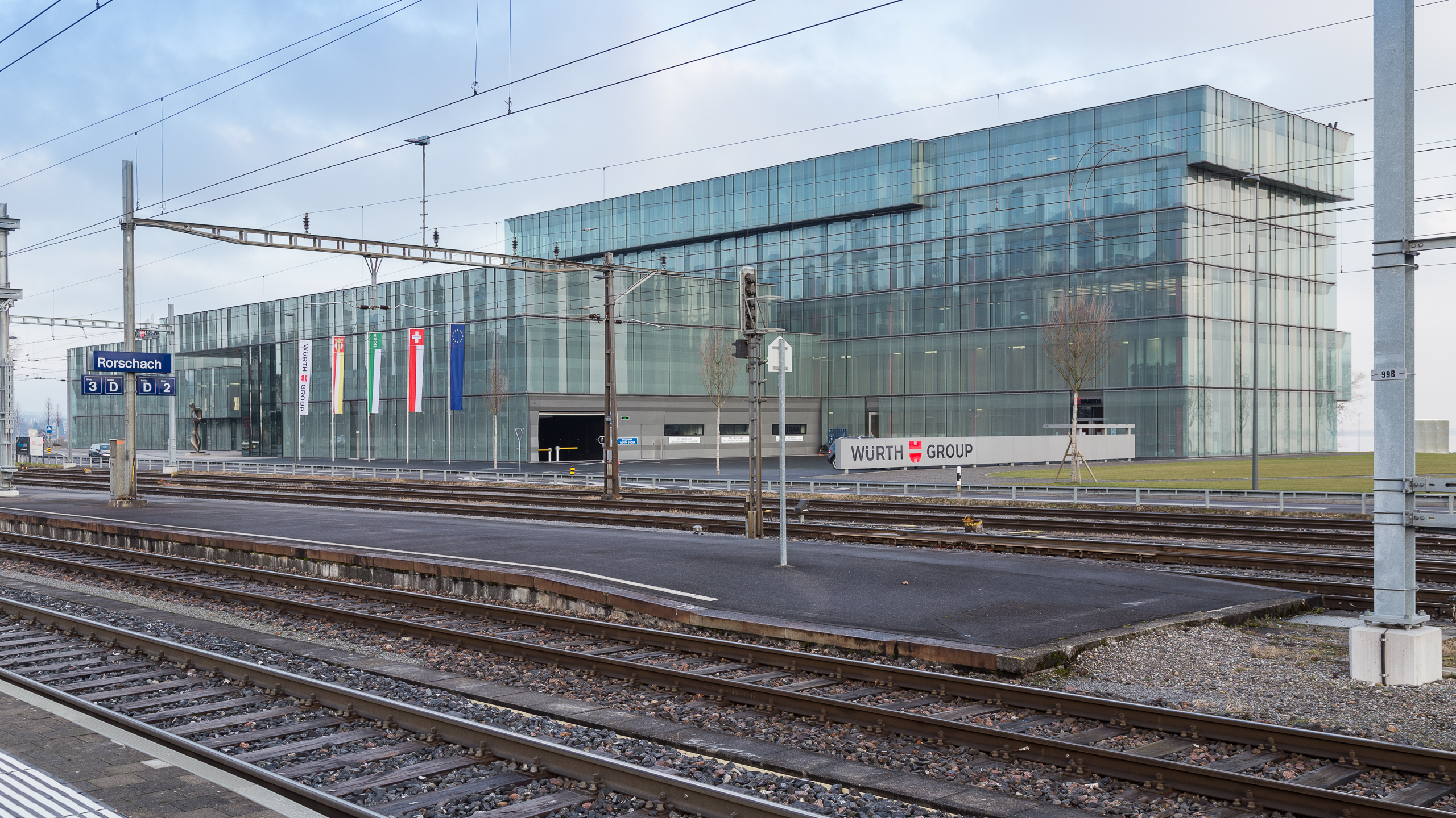 Gebäude der WÜRTH Group in Rorschach